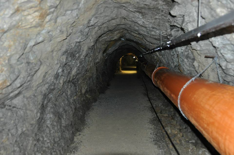 Notranjost Barbara rova